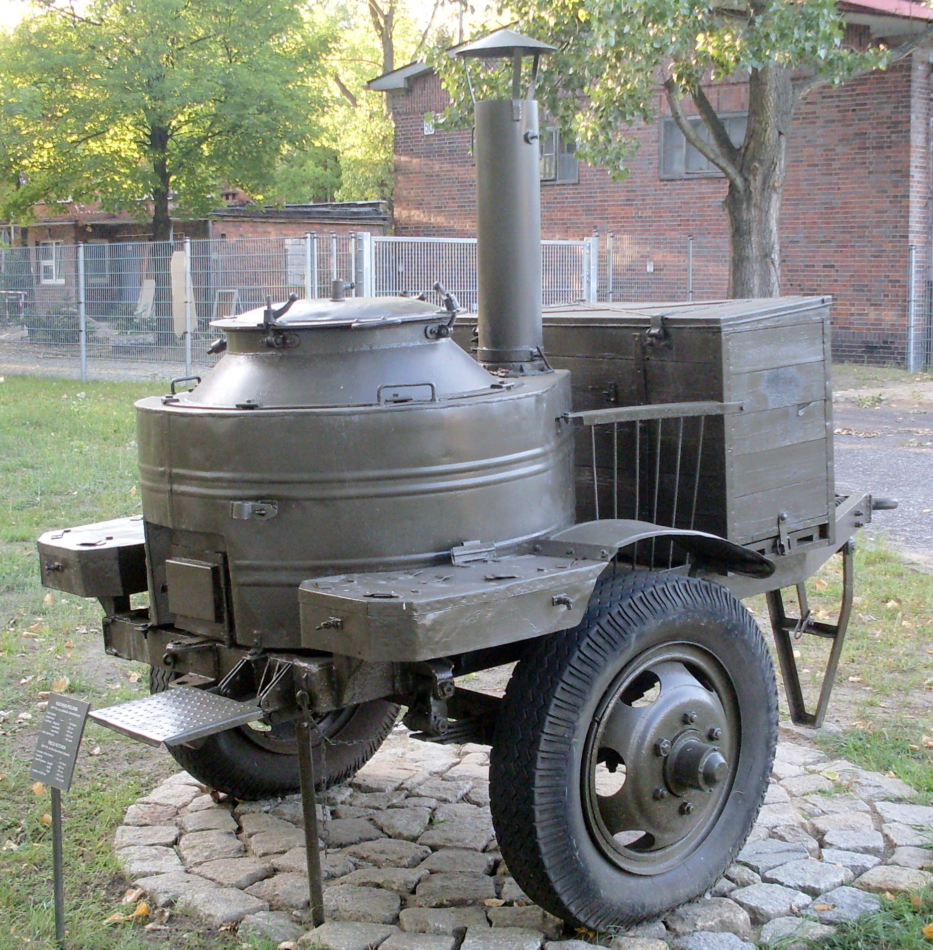 kuchnia_polowa_KP_110.